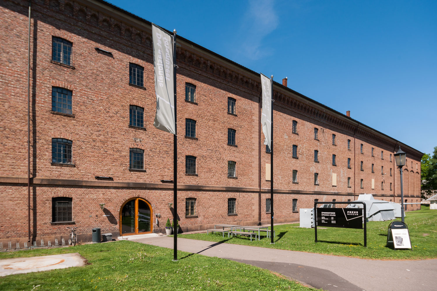 Magasin A, Karljohansvern, Preus museum